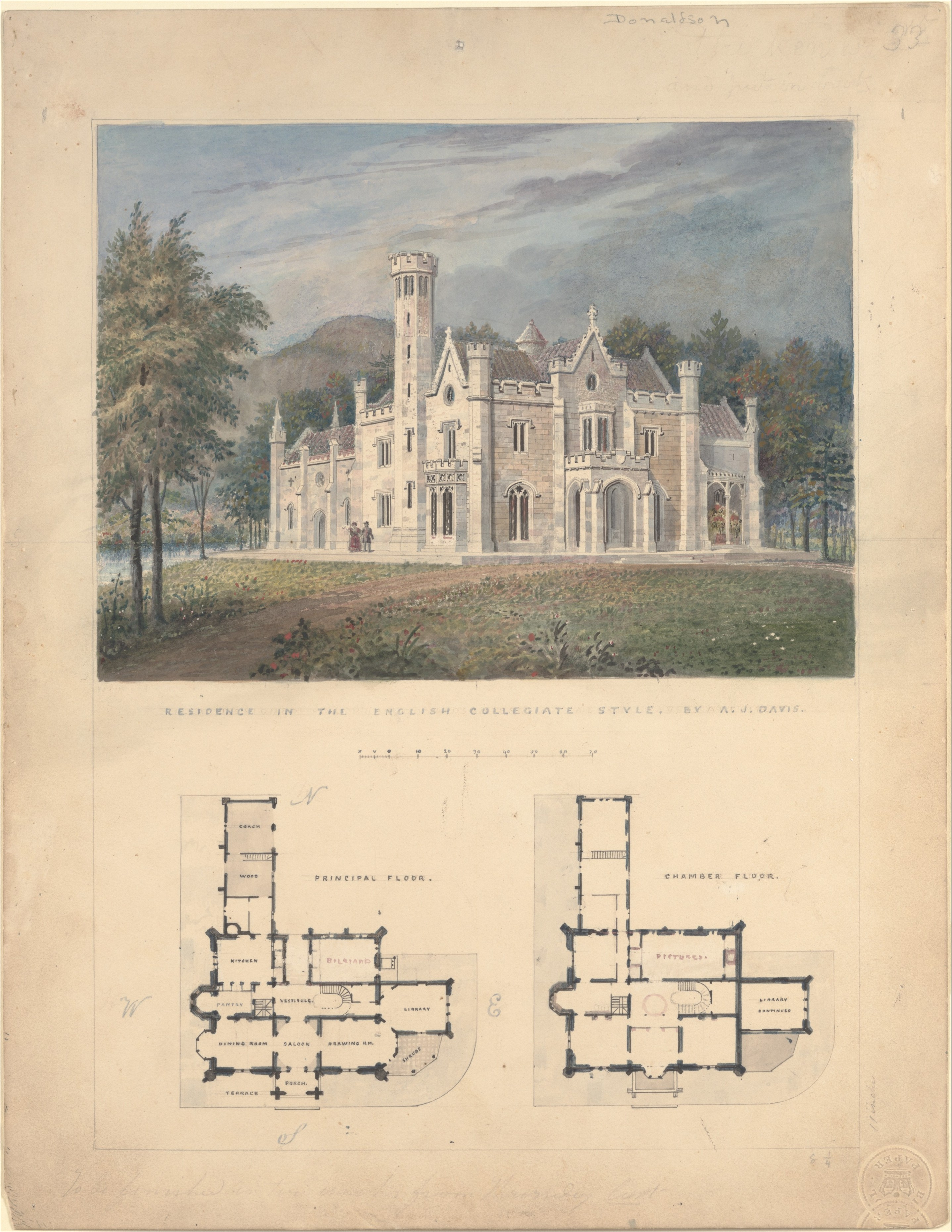 Drawing; Drawings